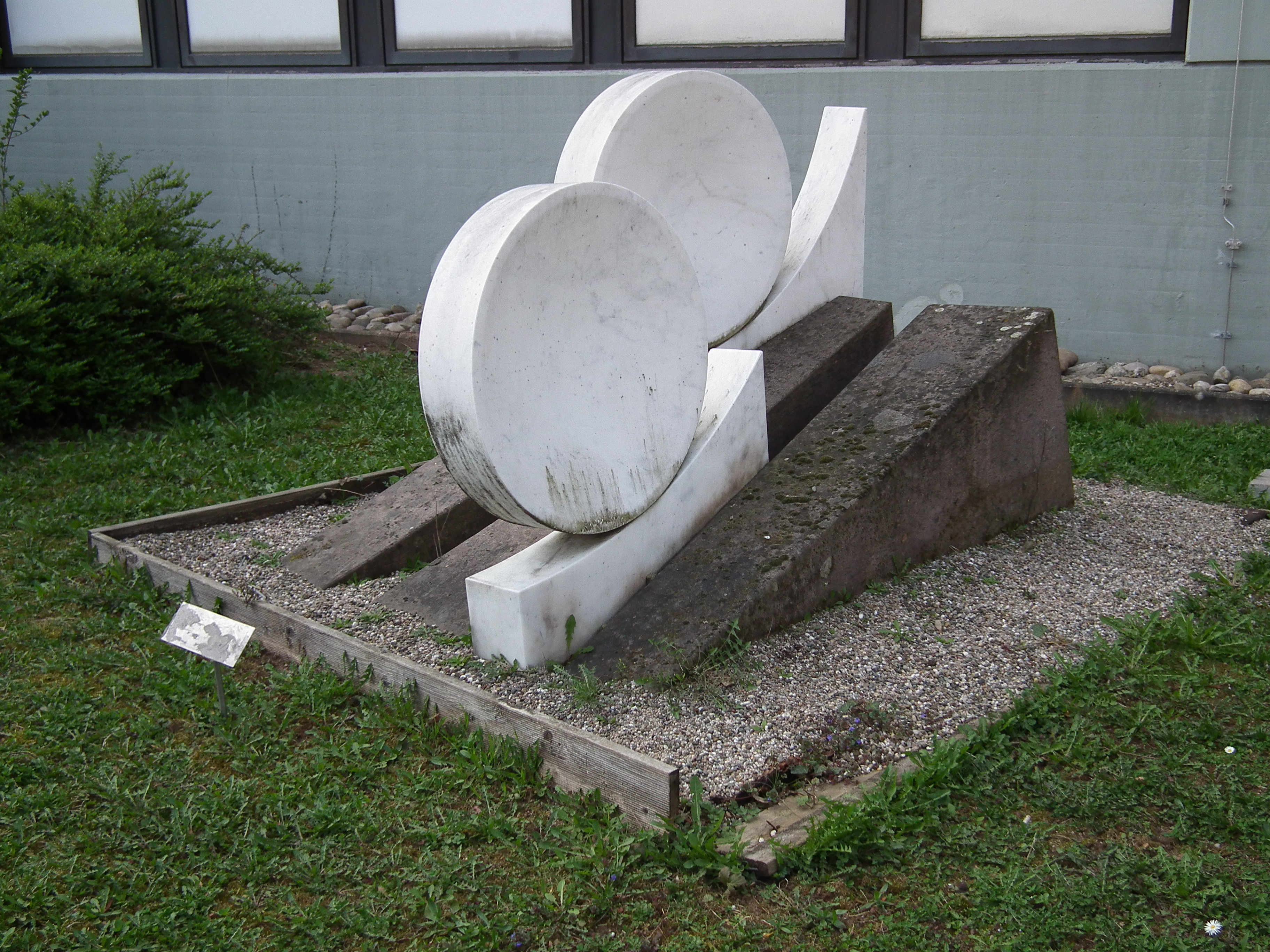 "Primavera" von Klaus Horstmann-Czech (1998/99), seit 2005 aufgestellt vor dem Krankenhaus Salem im Heidelberger Stadtteil Neuenheim (Baden-Württemberg, Deutschland)